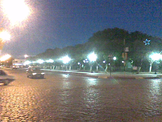 plaza principal de la localidad